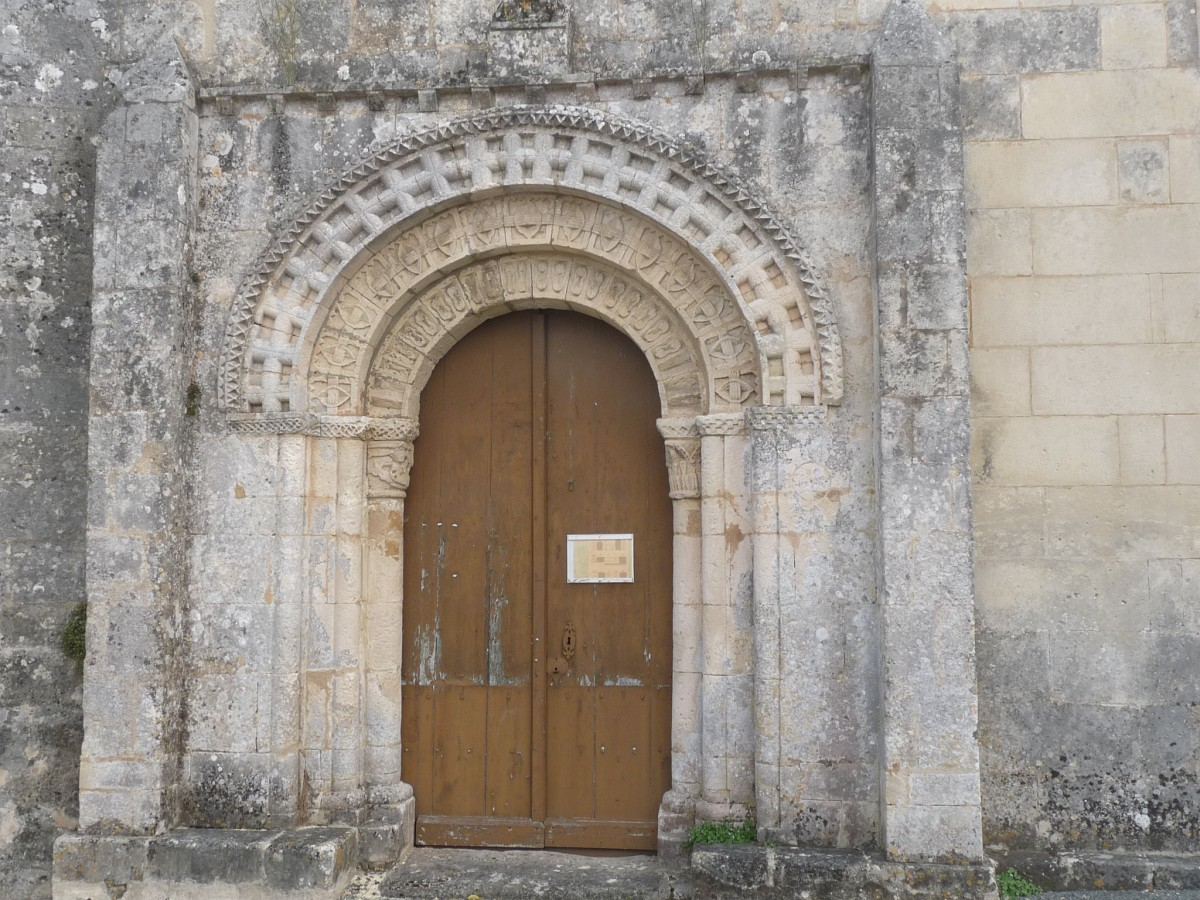 Portail de l'église de St-Georges-des-Agoûts, Charente-Maritime, France